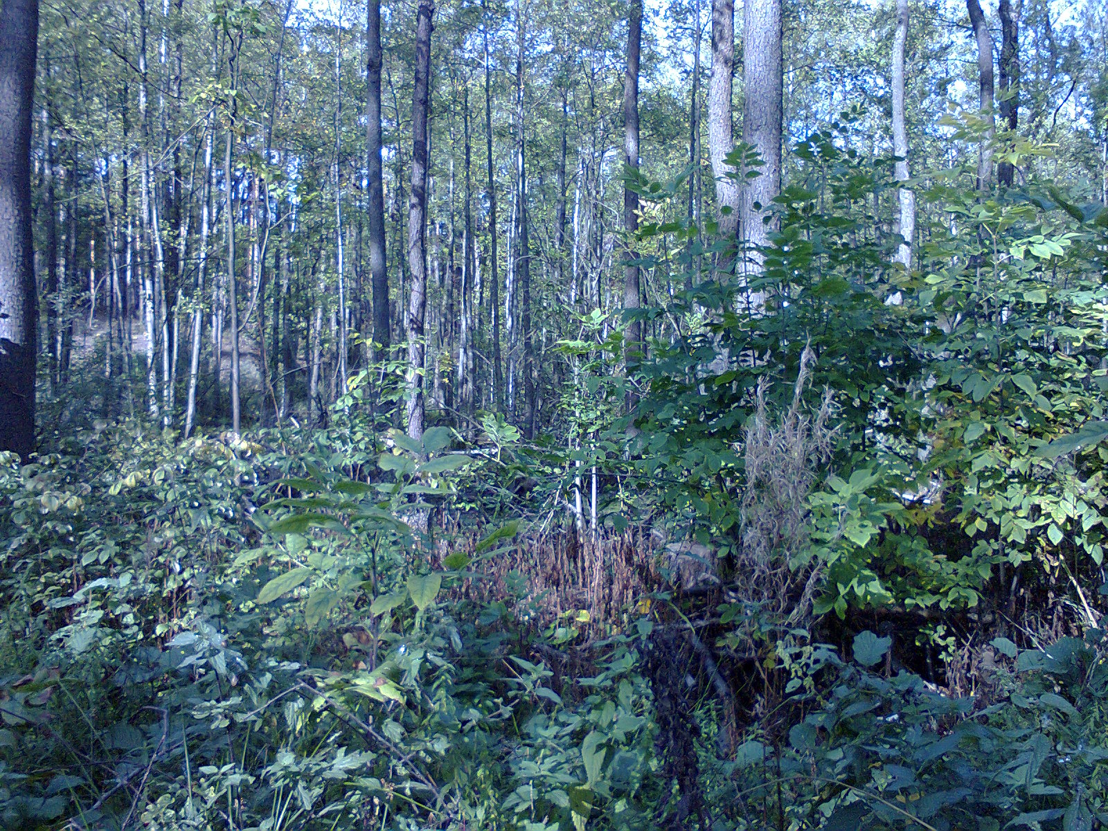 Ольховый лес под Ригой